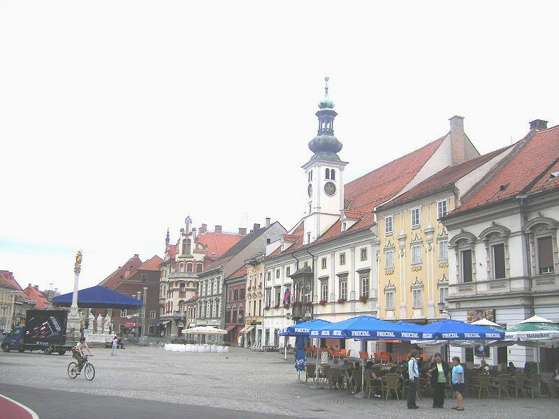 Maribor - Glavni Trg